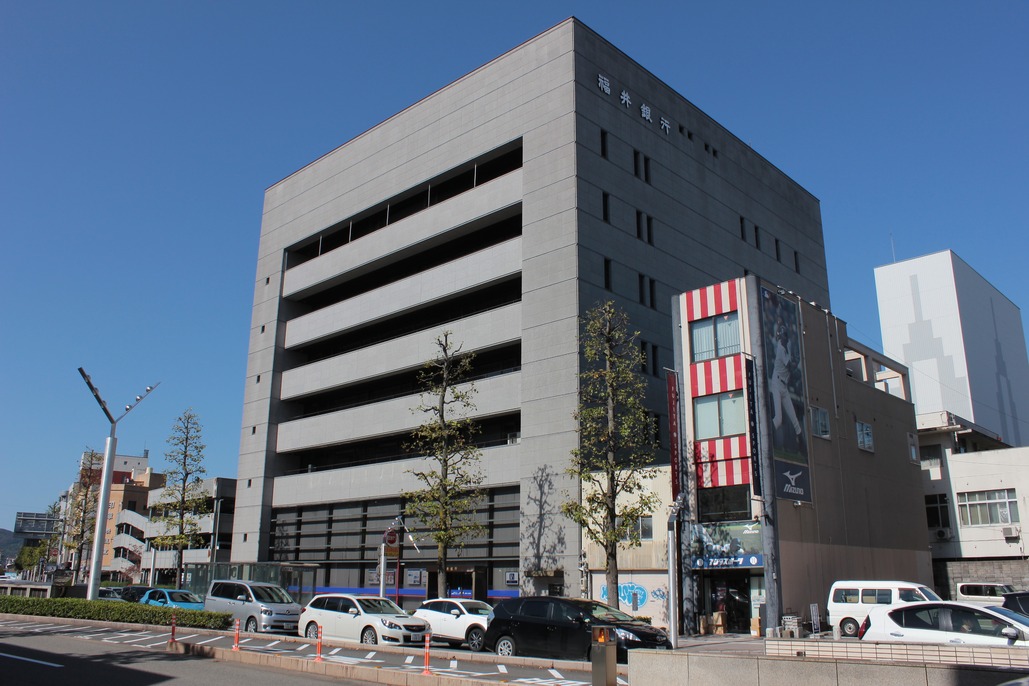 福井銀行本店の仮庁舎（福井県福井市）。本店建て替えのため2020年まで使用される。 Canon EOS Kiss X5